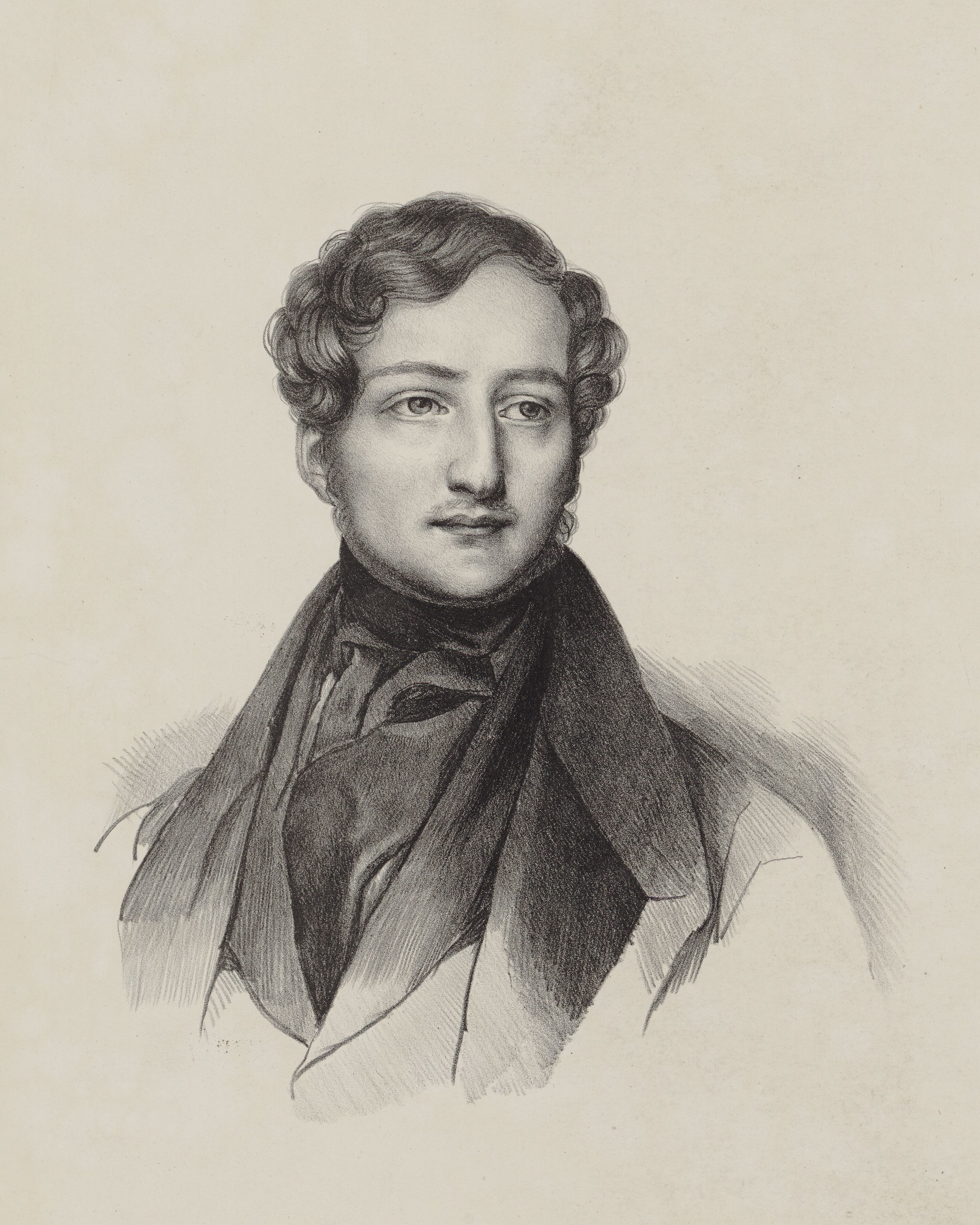 Portrait de Sigismond Thalberg, estampe